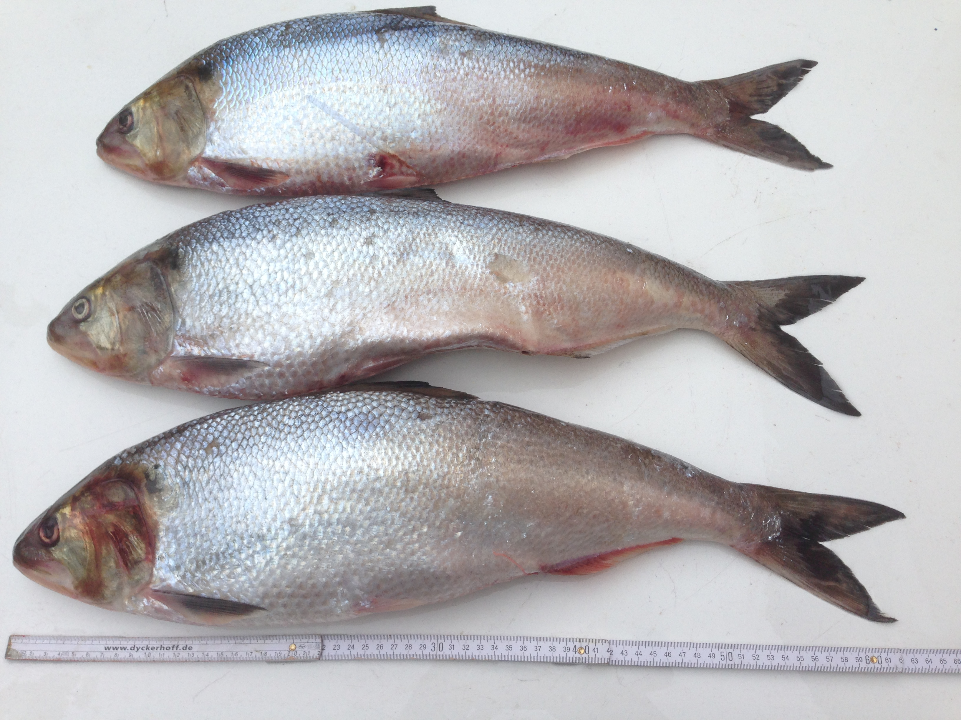 Maifische vom Rio Minho, nach Köln zum Poller Maigeloog geliefert anläßlich der Maifischbesatzfeier 2015 in Köln-Poll